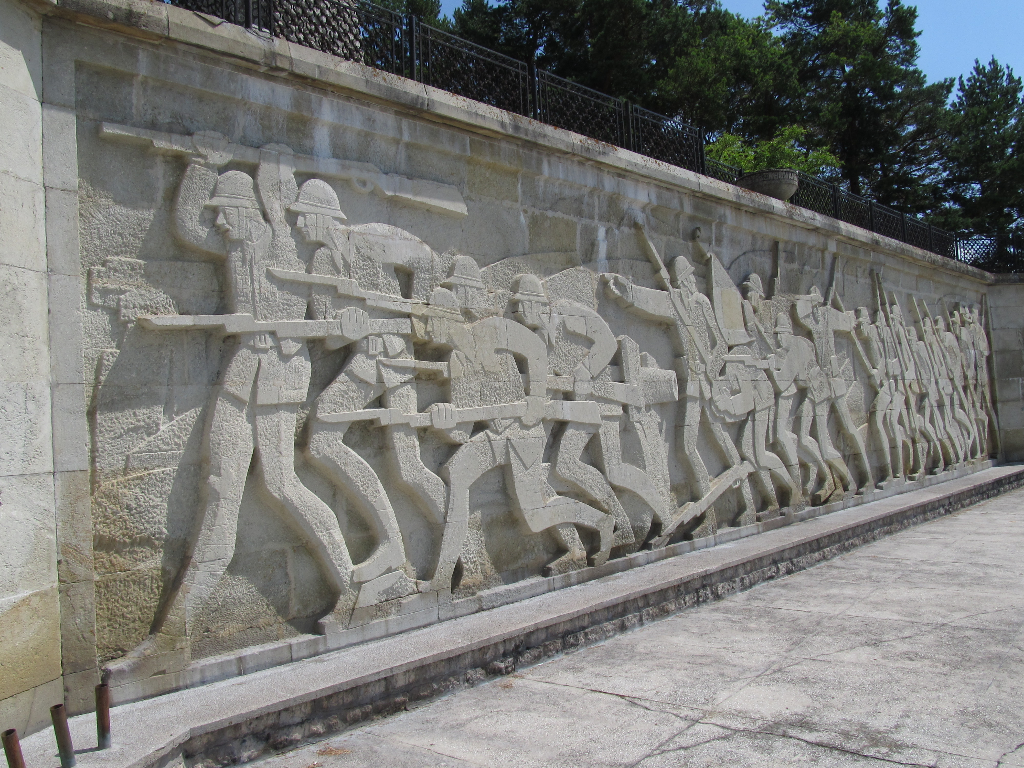 Basorelief ce infatiseaza soldati din perioada 1916-1918, detaliu arhitectonic al Mausoleului eroilor de la Mateias